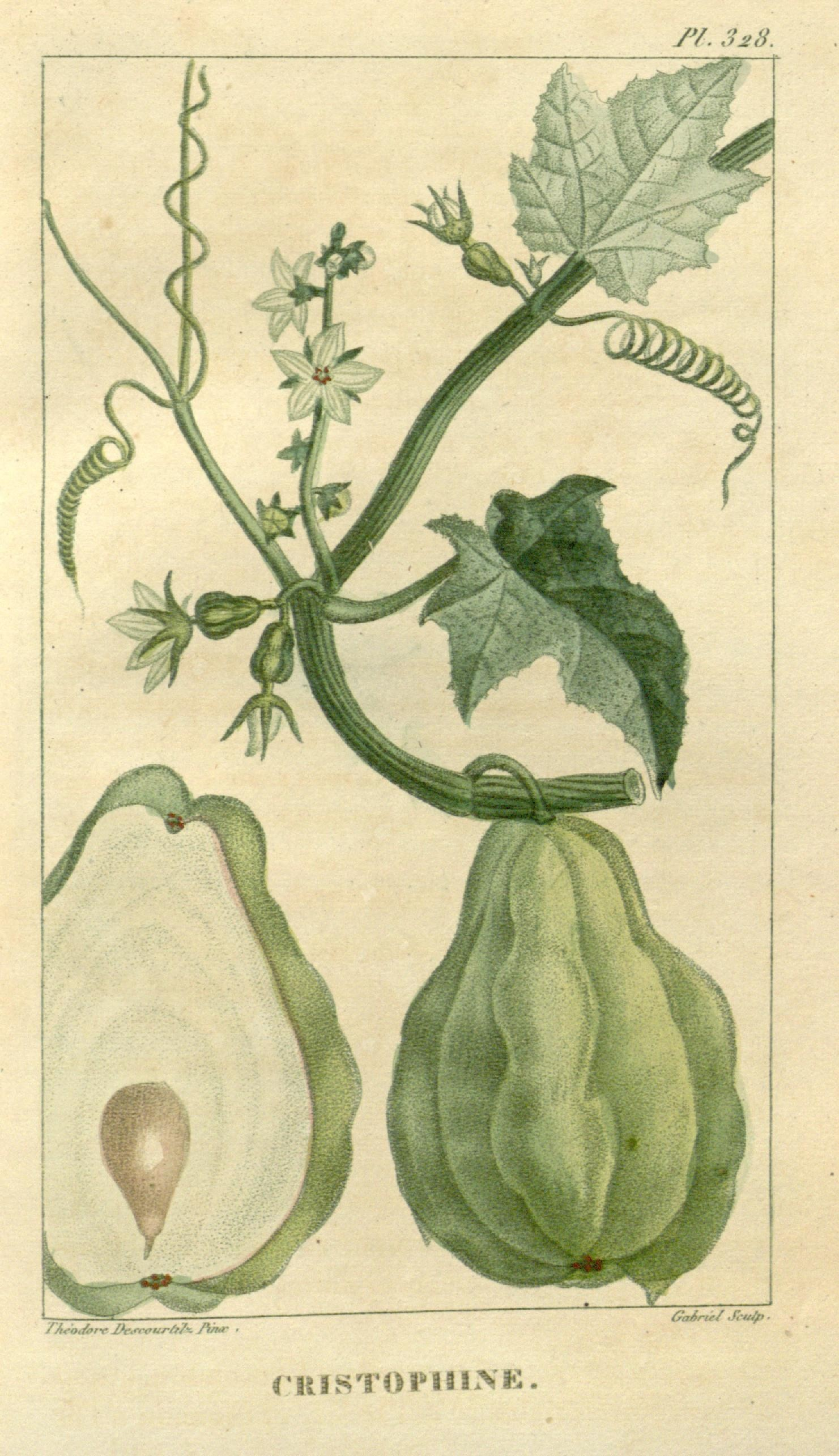 /Y. 3*8. ZA.o.far-,- /*.:.. ■.'r.s~/?7% A/UT CRISTOPHINE.